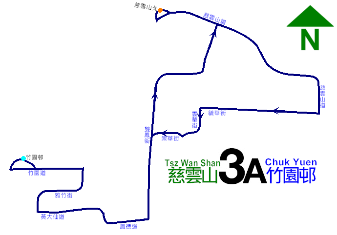 中文（香港）: 九巴3A線在1995年取消前的走線圖